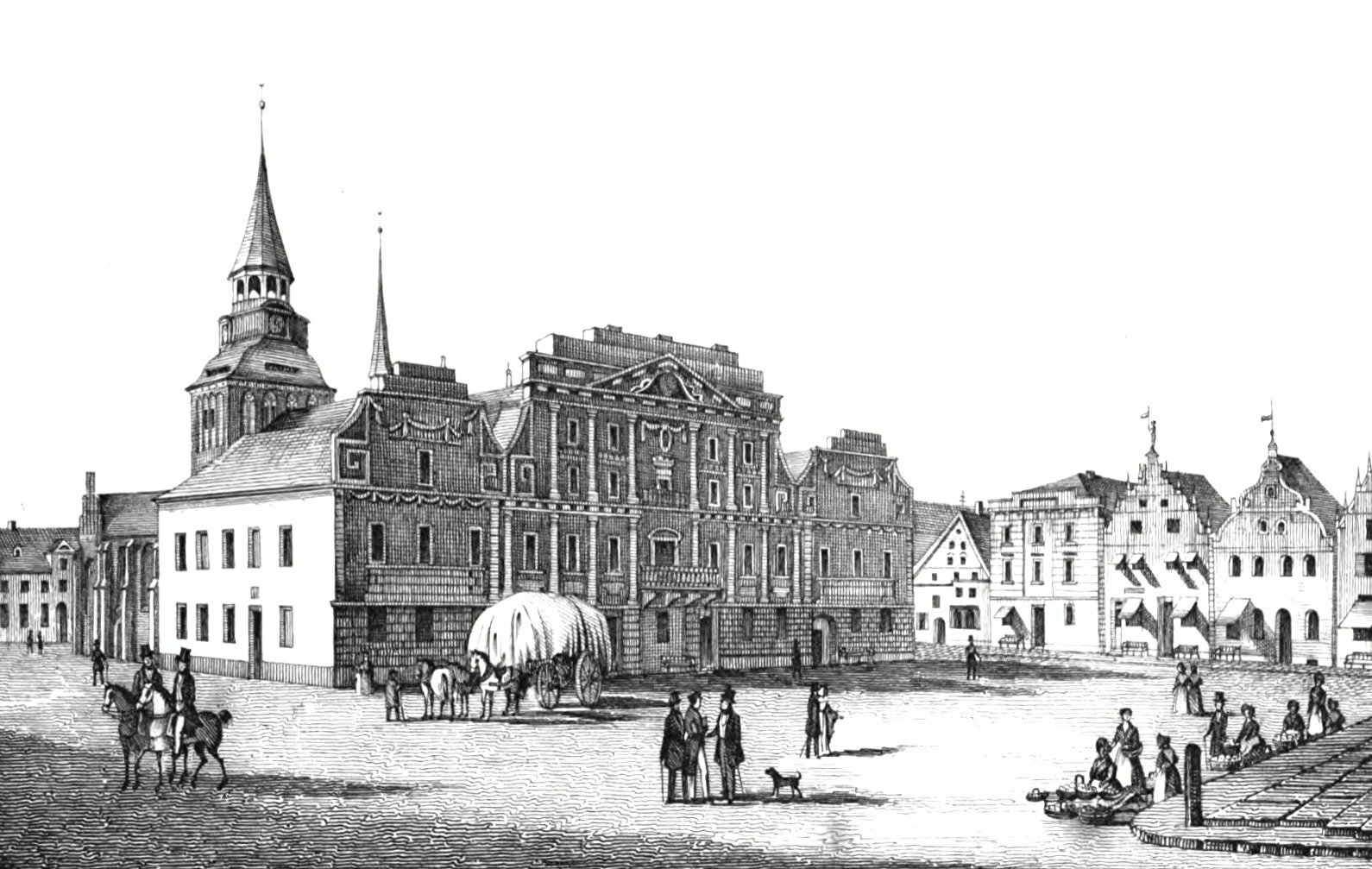 Marktplatz in Güstrow, frühes 18. Jahrhundert.